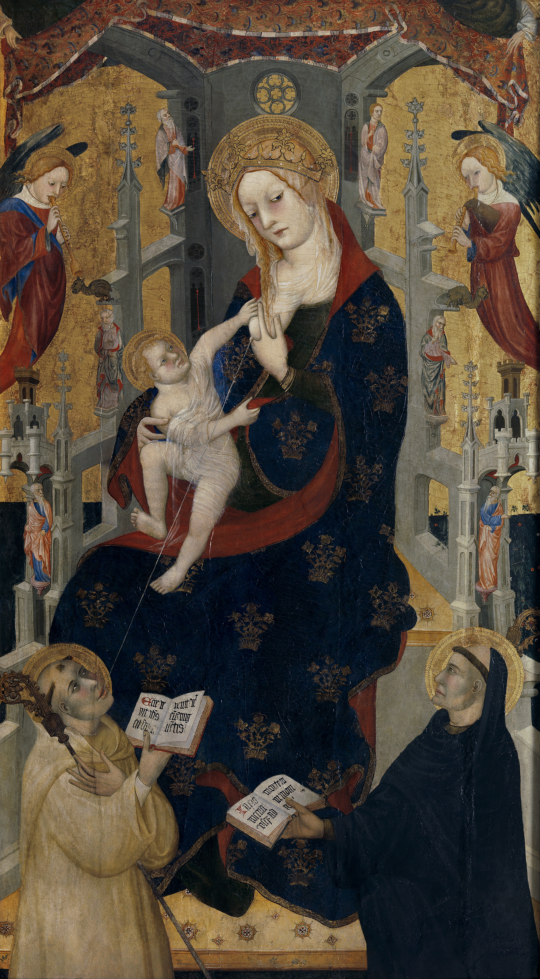 La obra representa a la Virgen María amamantando a su hijo, el Niño Jesús, y acompañada por San Benito de Nursia y por San Bernardo de Claraval.